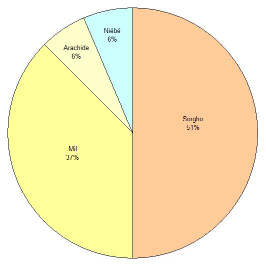 Utilisation des terres agricoles à Tougan (Burkina Faso), campagne 1997-1998.